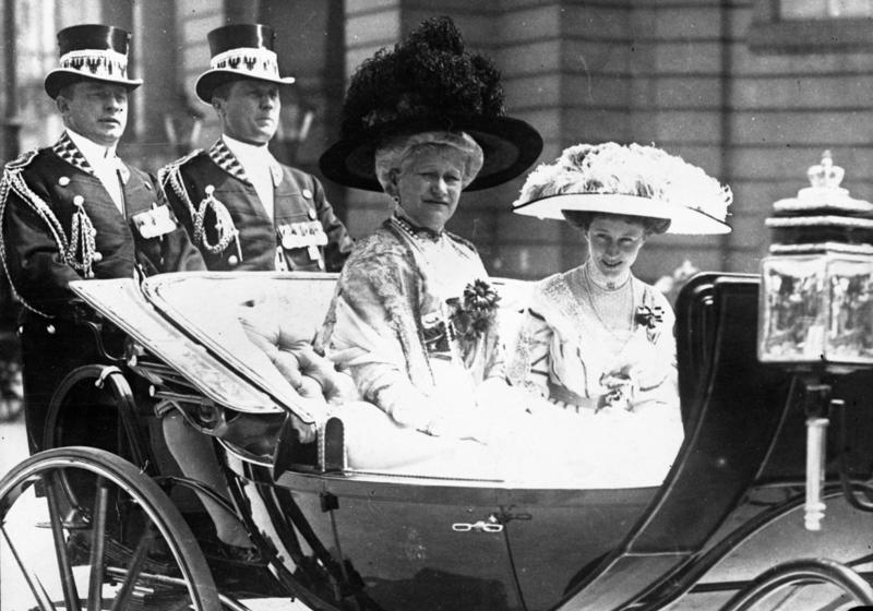 Kaiserin Auguste Victoria, die verstorbene Gattin des Kaisers mit ihrer Tochter Victoria Louise, bei einer Ausfahrt in Berlin